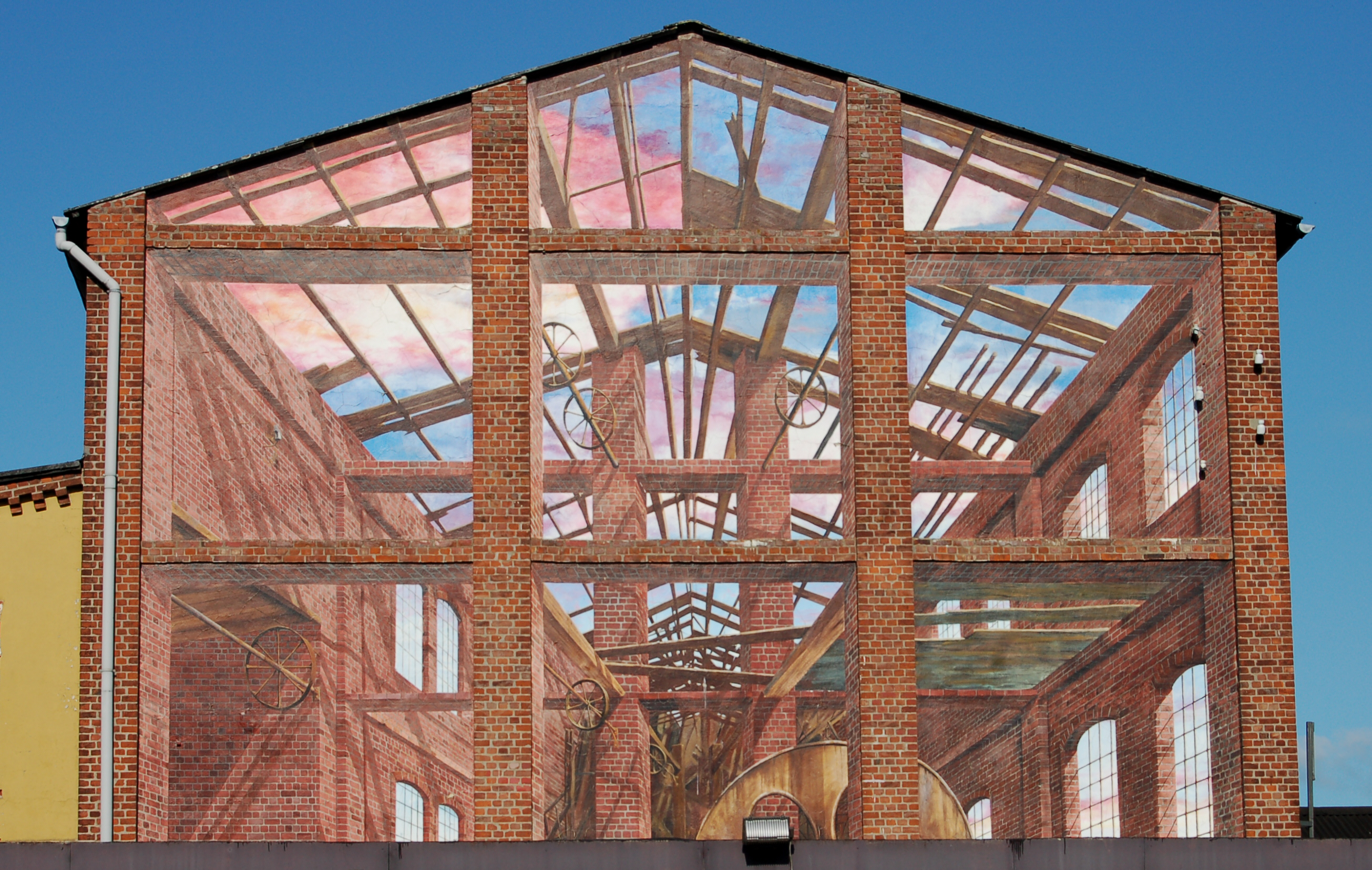 Das Kunstwerk an der Wand der Klostermühle in Uetersen Das Kunstwerk hat eine Größe von ca. 11 x 9 Meter und stammt von dem Uetersener Künstler Prof. Erhard Göttlicher.